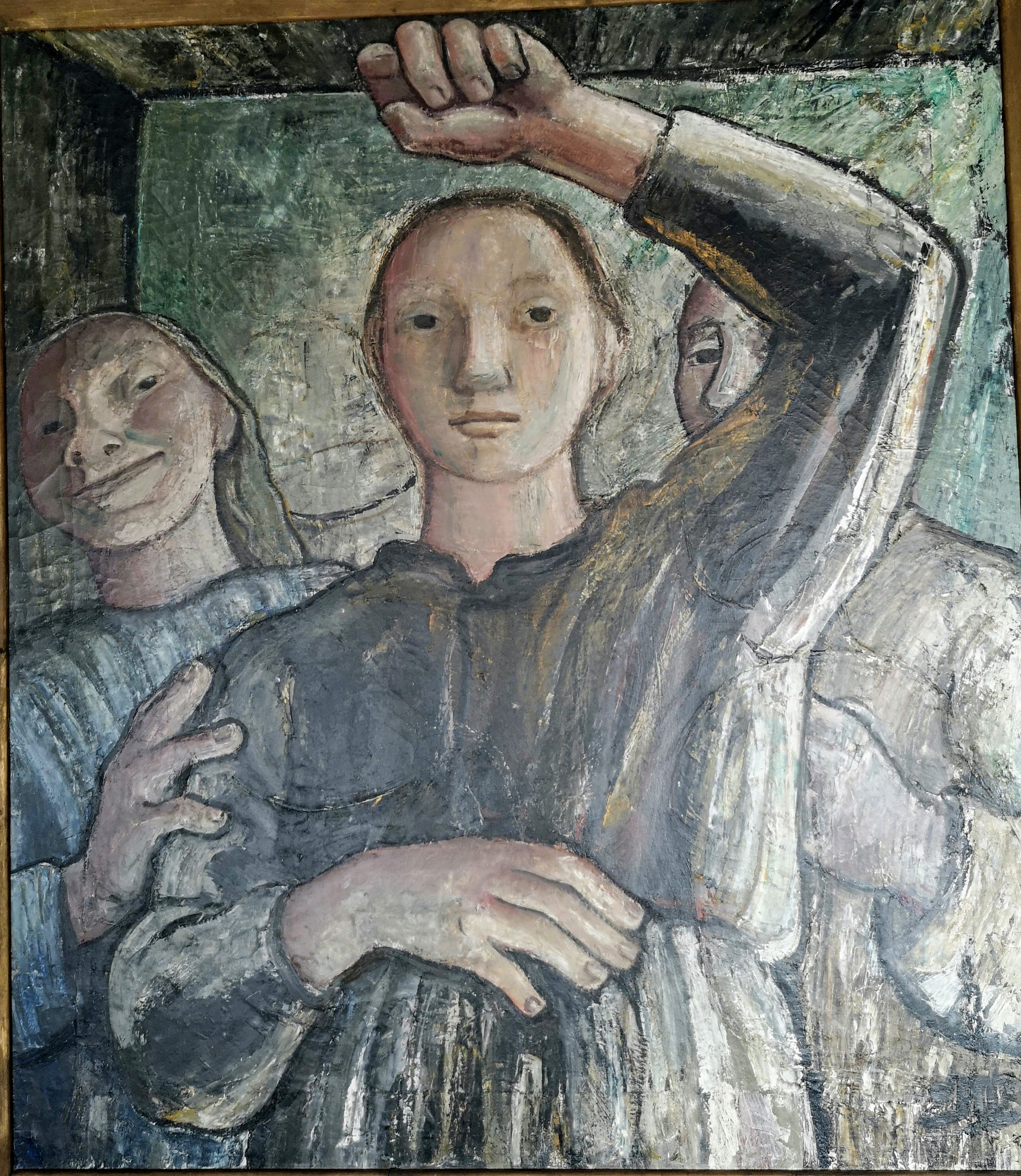 tre kvinder ser i et spejl, den ene med hånden over hovedet. oliemaleri